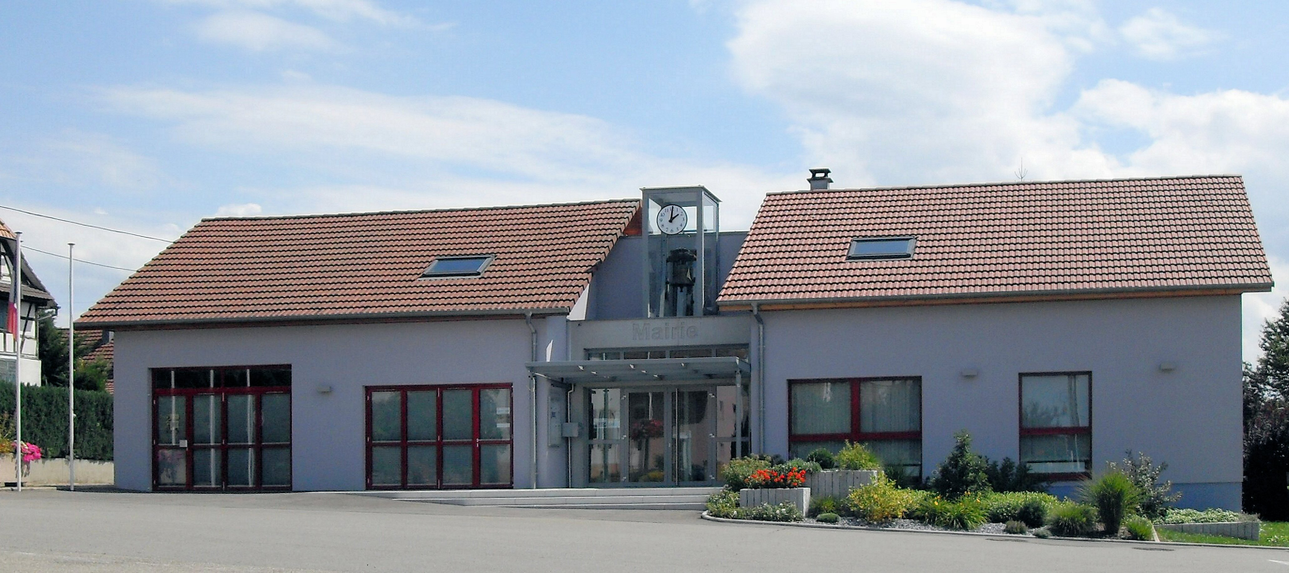 La mairie de Henflingen